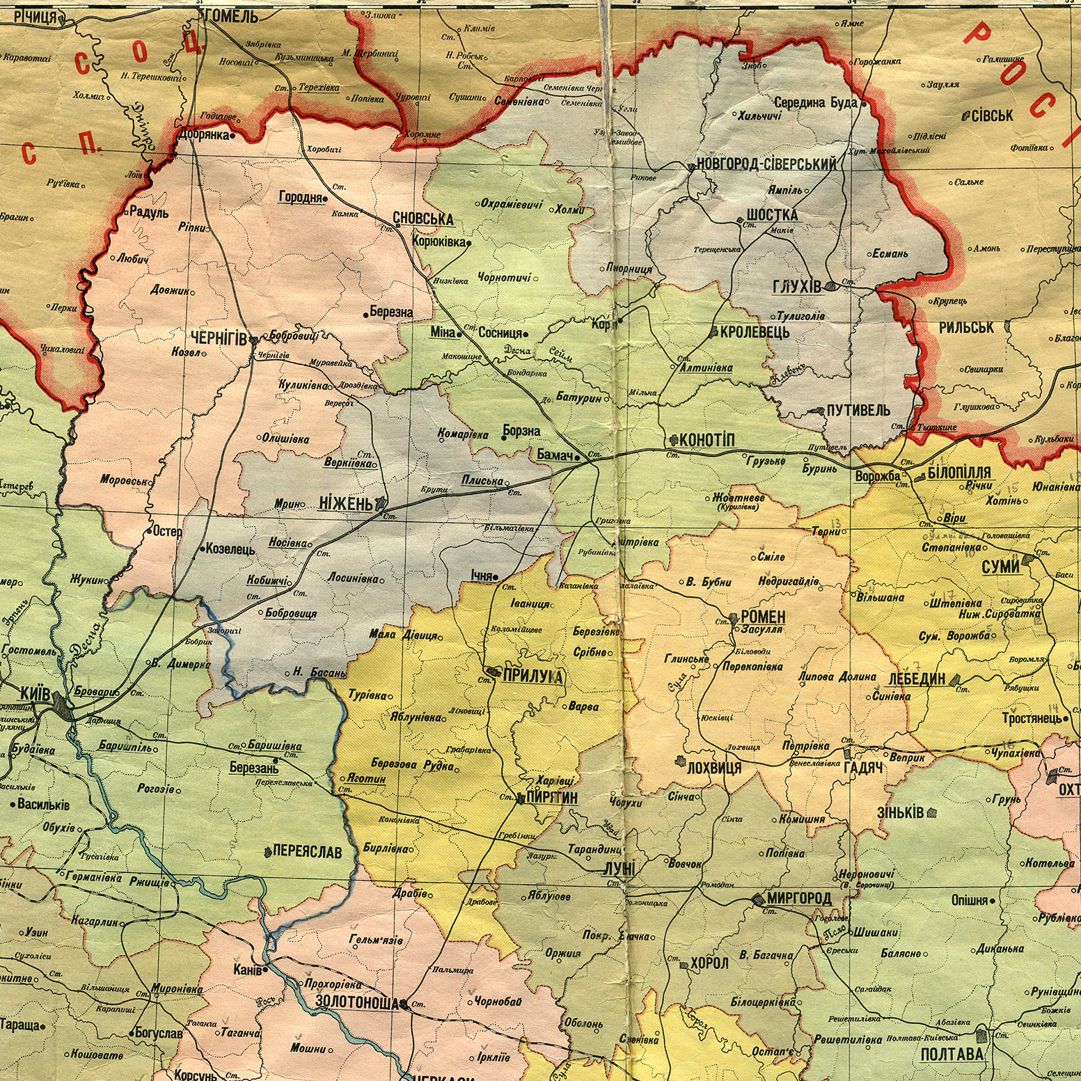 Територія колишньої Чернігівської губернії, фрагмент мапи Української соц. рад. республіки, адміністративний поділ від 1 березня 1927